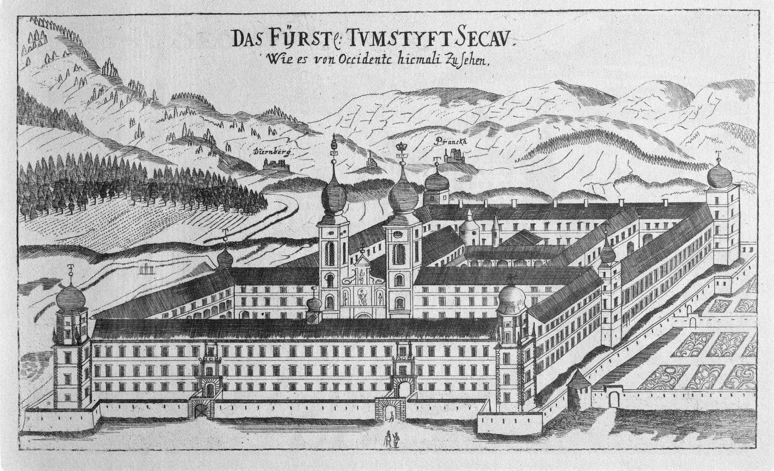 G. M. Vischers Käyserlichen Geographi, Topographia Ducatus Stiriae, Das ist: Eigentliche Delineation / und Abbildung aller Städte / Schlösser / Marcktfleck / Lustgärten / Probsteyen / Stiffter / Clöster und Kirchen / so es sich im Herzogthumb Steyrmarck befinden; Und anjetzo Umb einen billichen Preyß zu finden seynd Bey Johann Bitsch Universitäts Buchhandlern / Auff dem Juden=Platz bey der guldenen Saulen. Graz 1681 Die Nummerierung der Dateien folgt der alphabetischen Reihung der Ortsnamen und entspricht nicht dem Vischer-Register